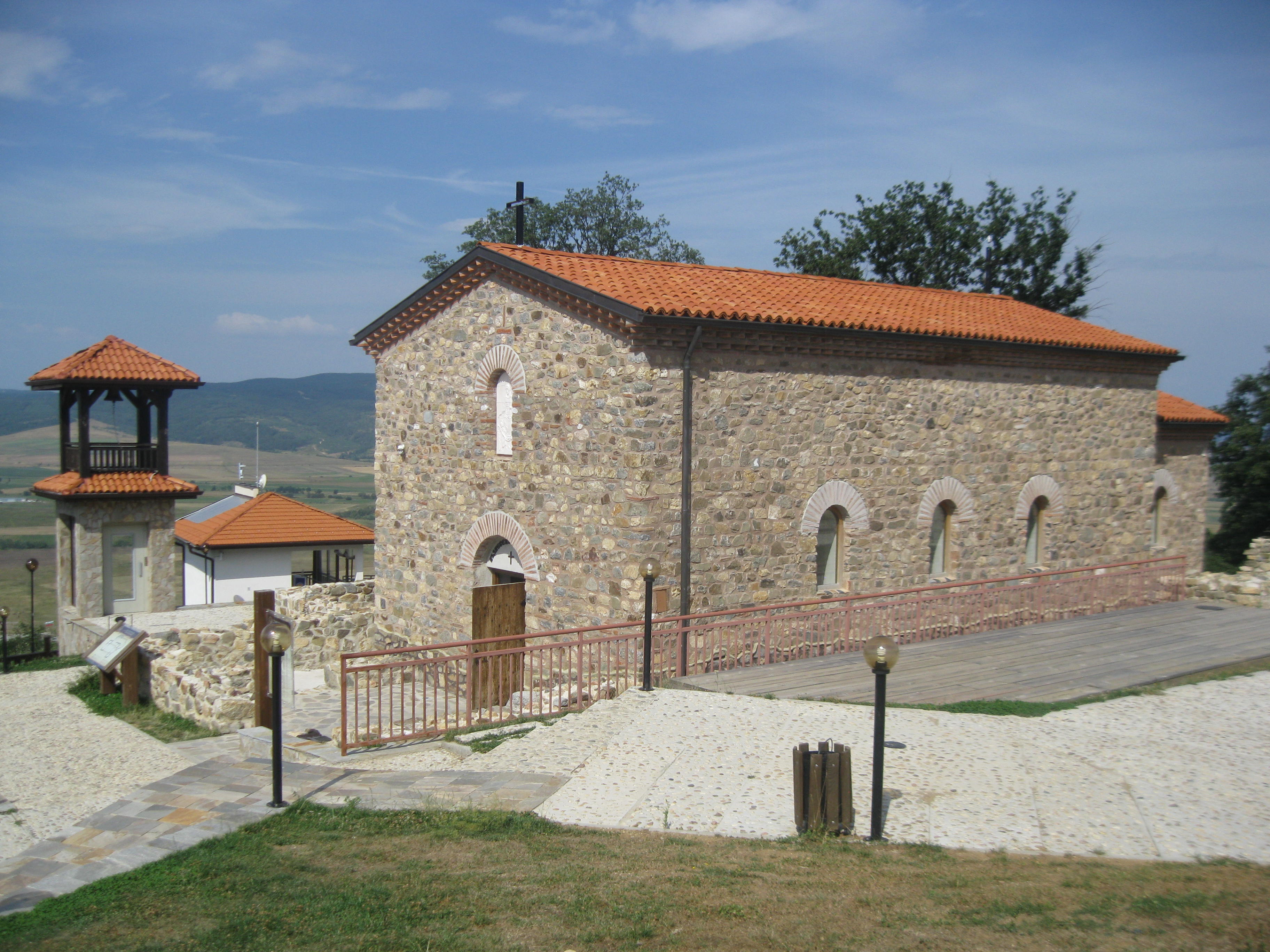 Късноантична крепост Цари Мали Град